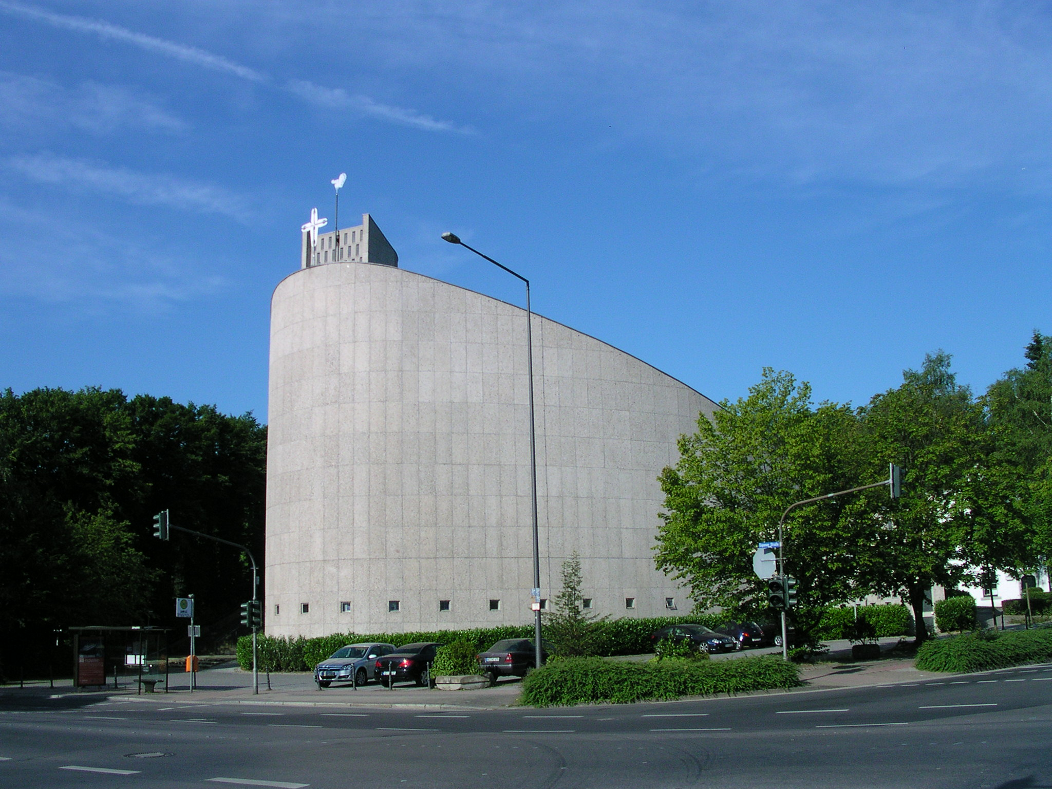 katholische Gregoriuskirche am Jahnplatz in Aachen, 1967 eingeweiht, Architekt Stefan Leuer. Interessant ist die Hanglage, die zwei Kulträume übereinander ermöglicht, unten einen kleinen intimen, ober einen großen. Die kleinen Fenster sind innen mit Texten in Blindenschrift versehen.